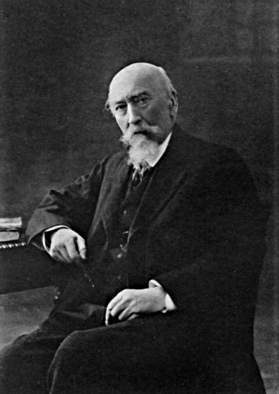 French indologist Auguste Barth (1834-1916)